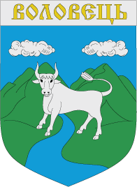 герб містечка Воловець